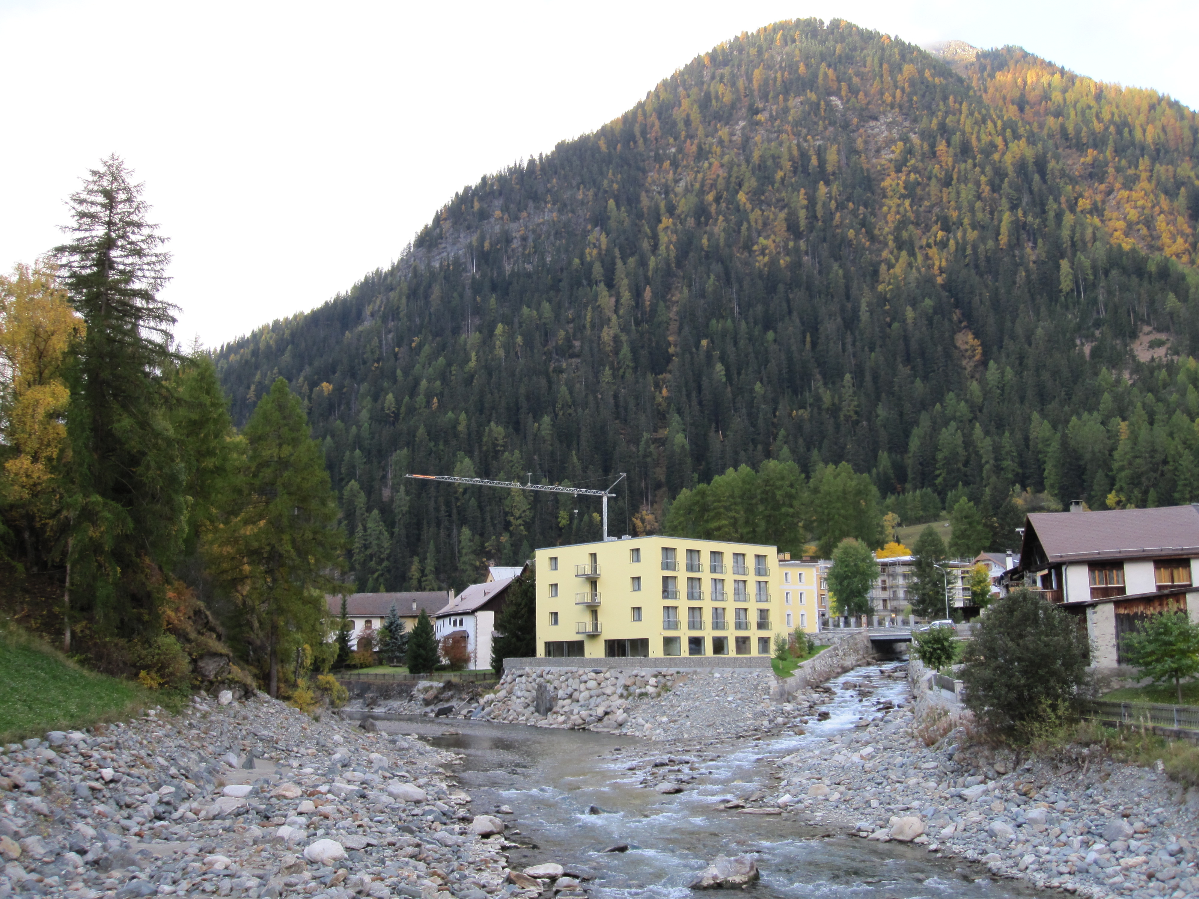 erste Schweizer Burn-out-Klinik: Clinica Holistica Engiadina in Susch (Unterengadin, Kanton Graubünden)